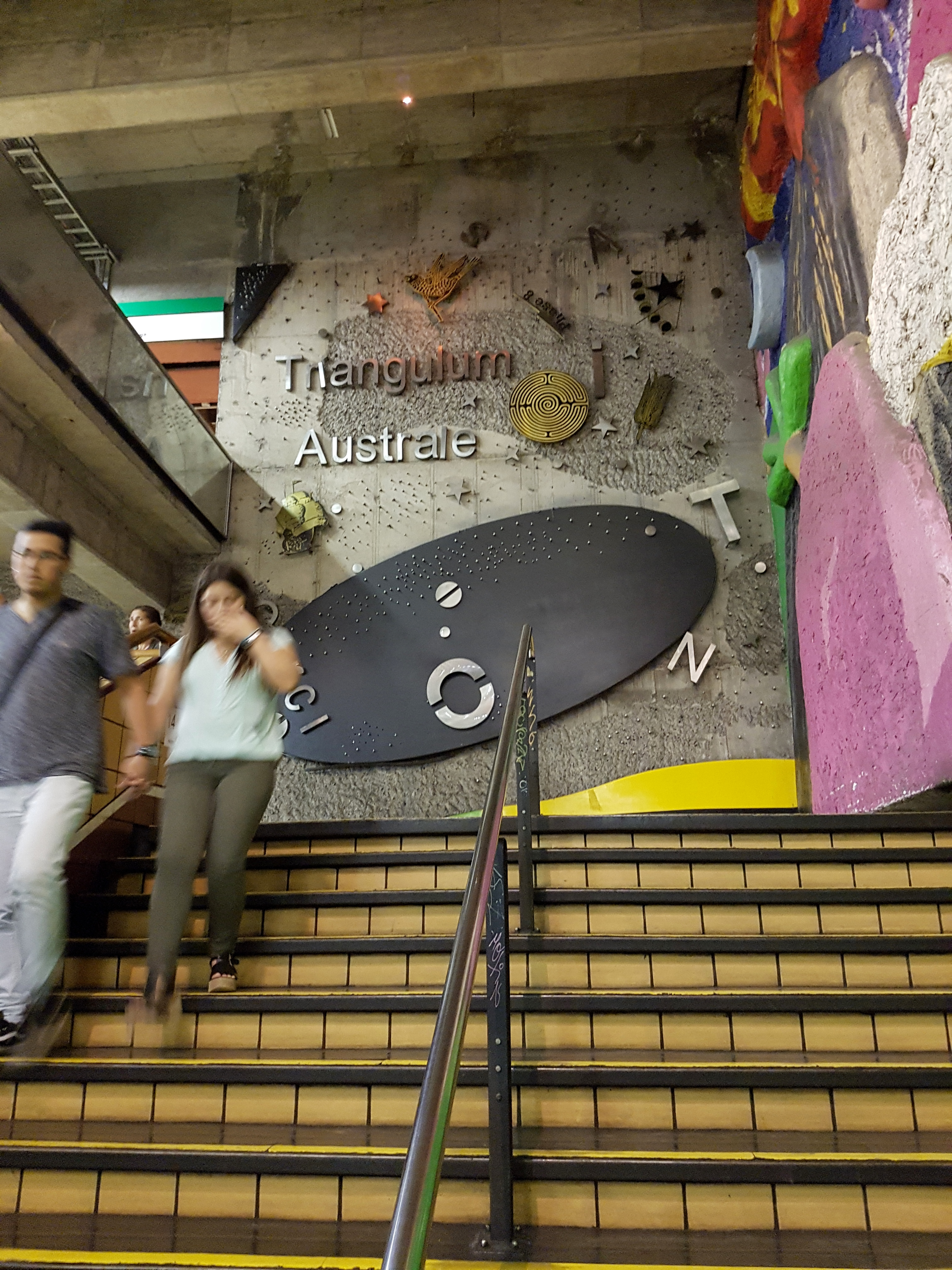 Vía Láctea (técnica mixta, 1998), mural del pintor chileno Francisco Smythe en la estación de metro Baquedano, Santiago de Chile.